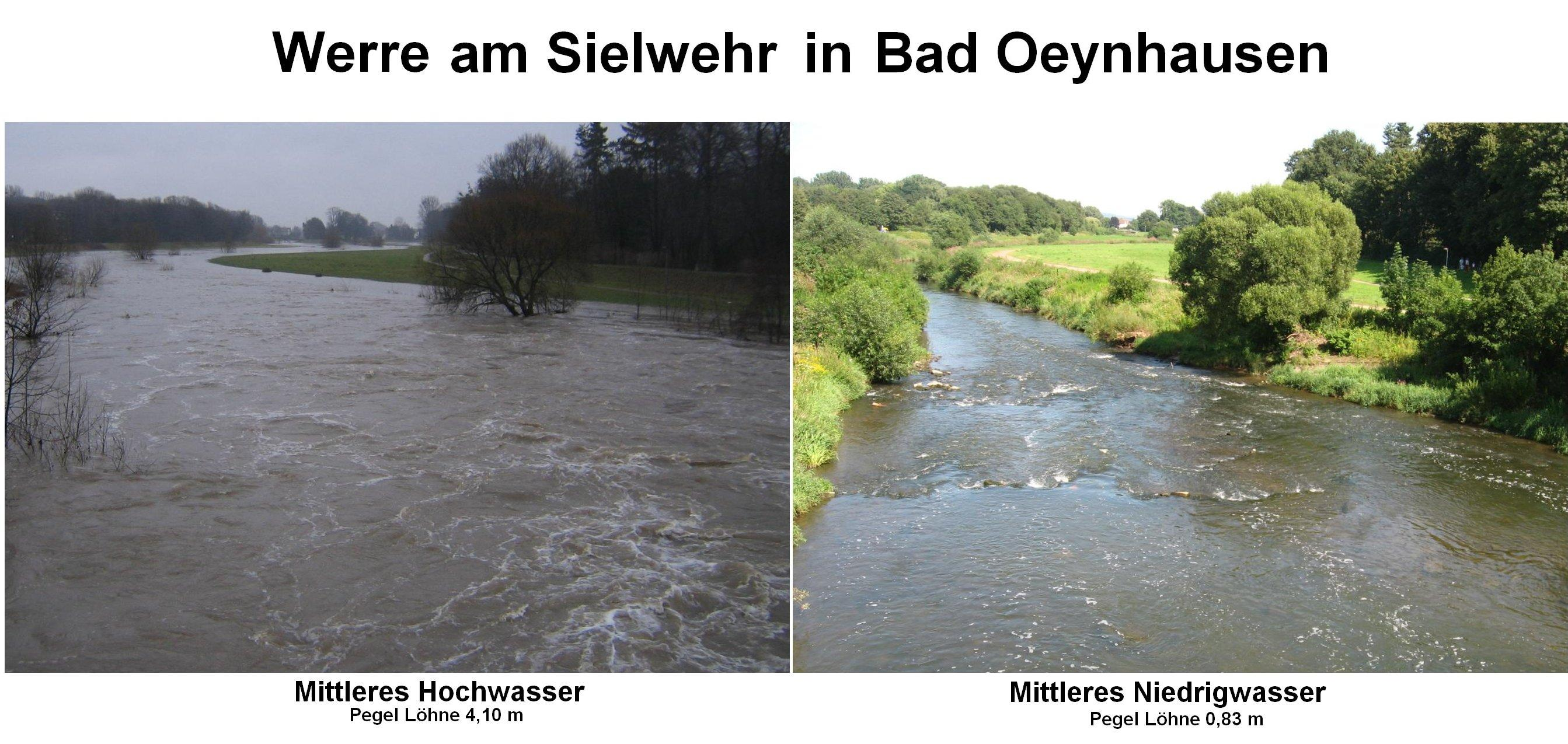 Vergleichsbild der Werre am Sielwehr in Bad Oeynhausen